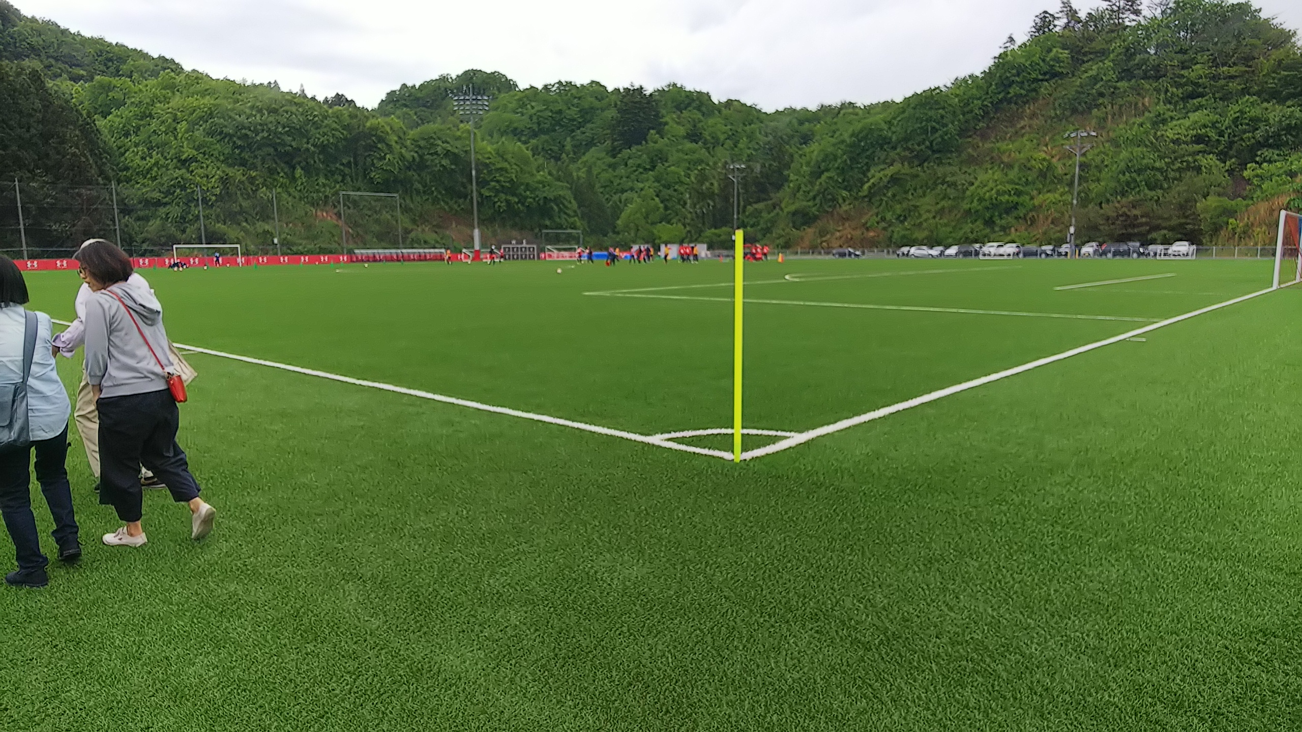 いわきFCフィールド。いわきFCパーク内にある練習場兼試合会場